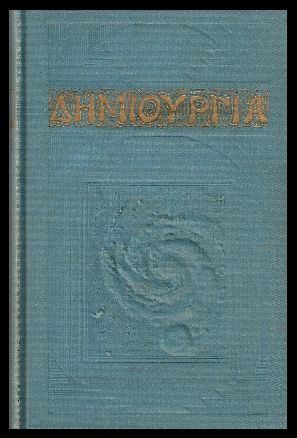 Το βιβλίο Δημιουργία, έκδοση 1927